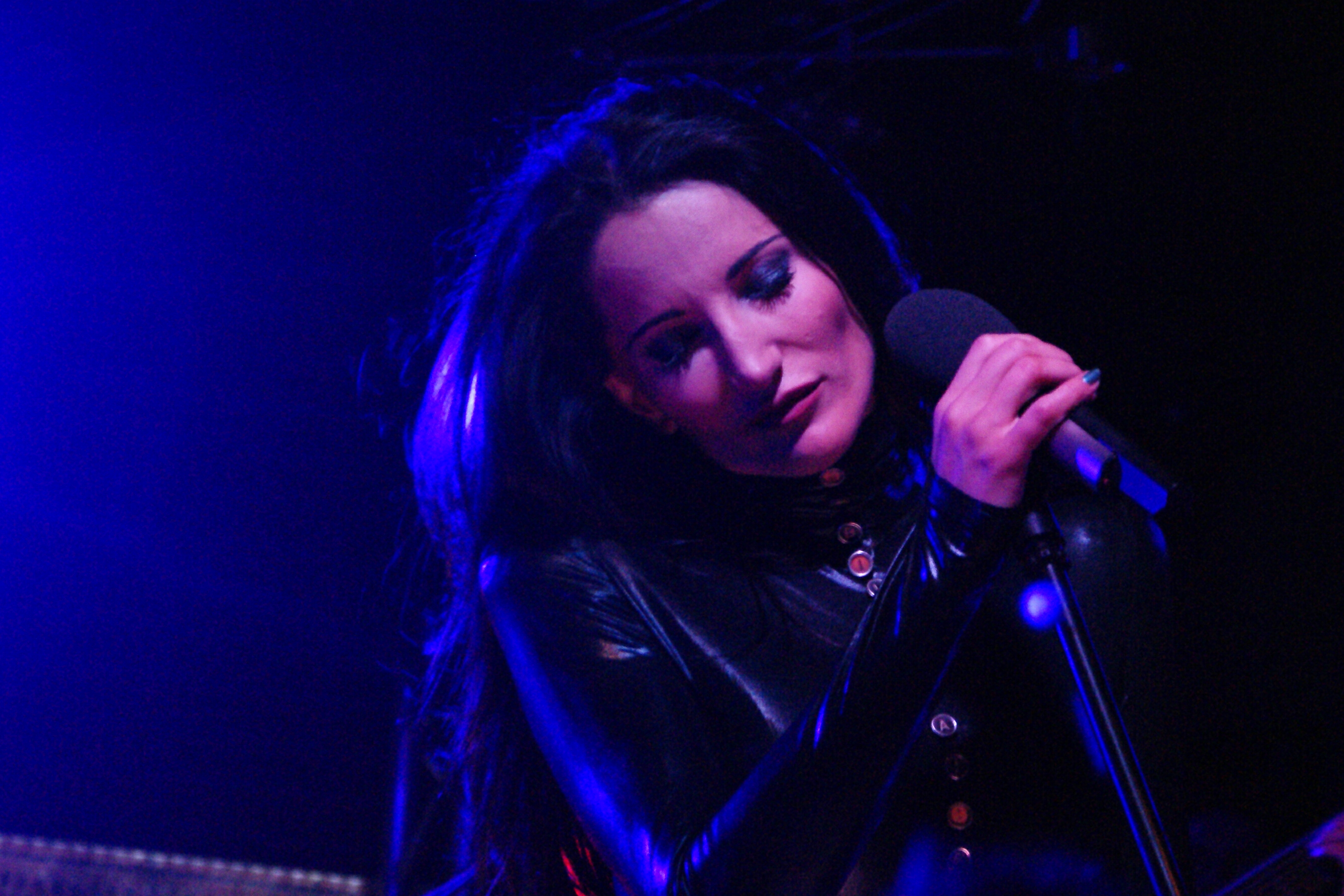 Justyna Steczkowska at concert XV in Hard Rock Cafe (Warsaw)